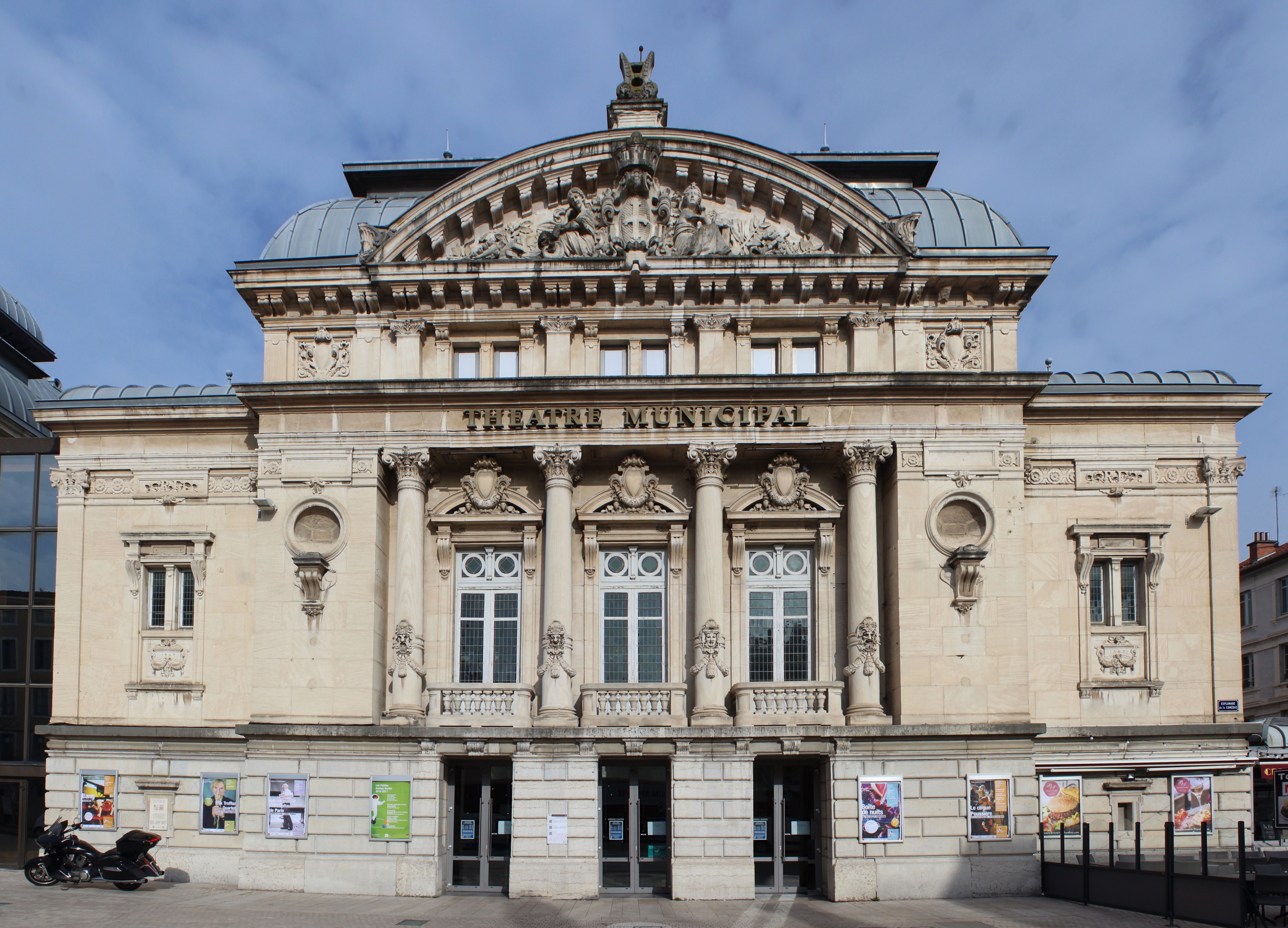 Théâtre de Bourg-en-Bresse.